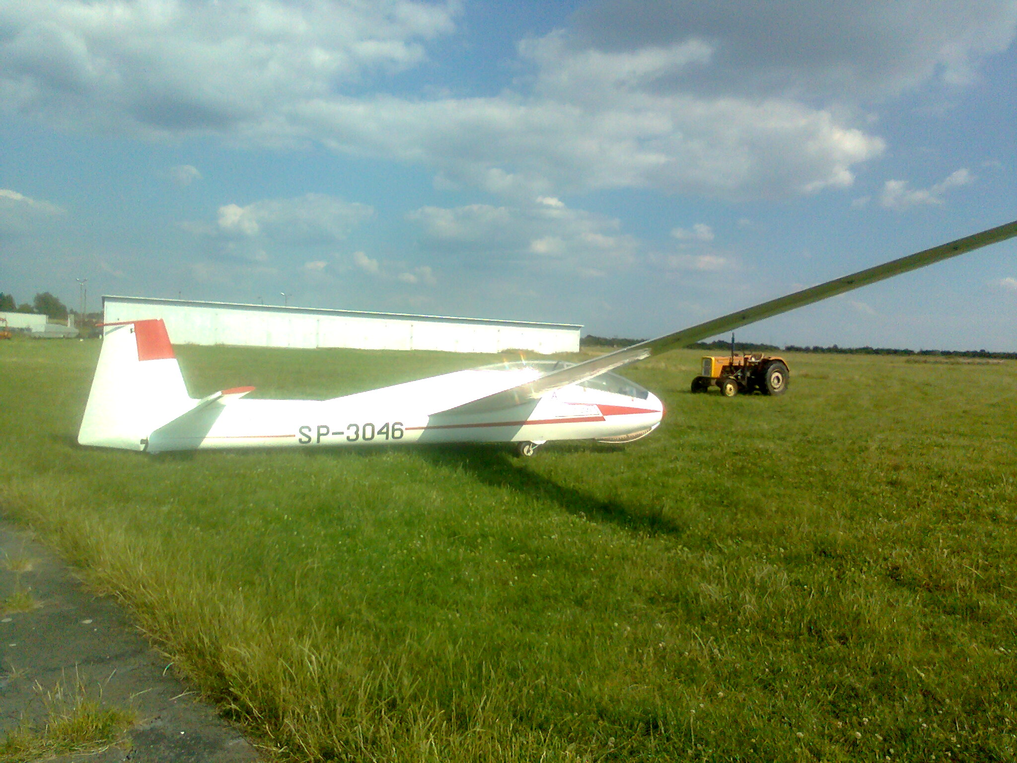 SZD-9 Bocian